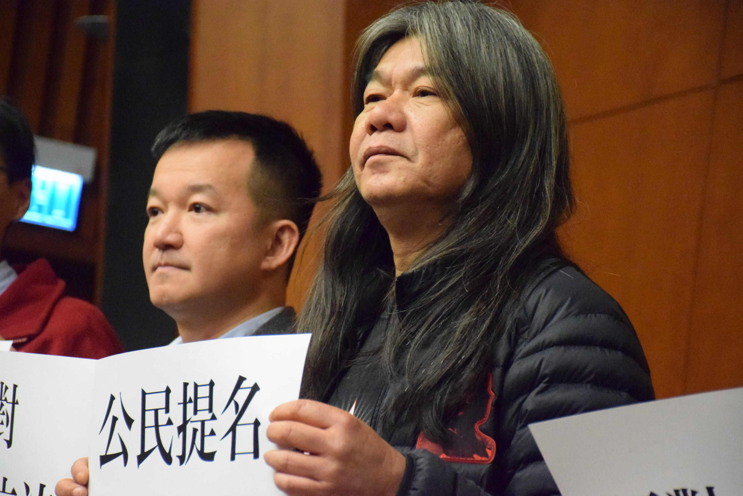 中文（香港）: 香港激進民主派立法會議員梁國雄宣佈爭取公民提名選特首。